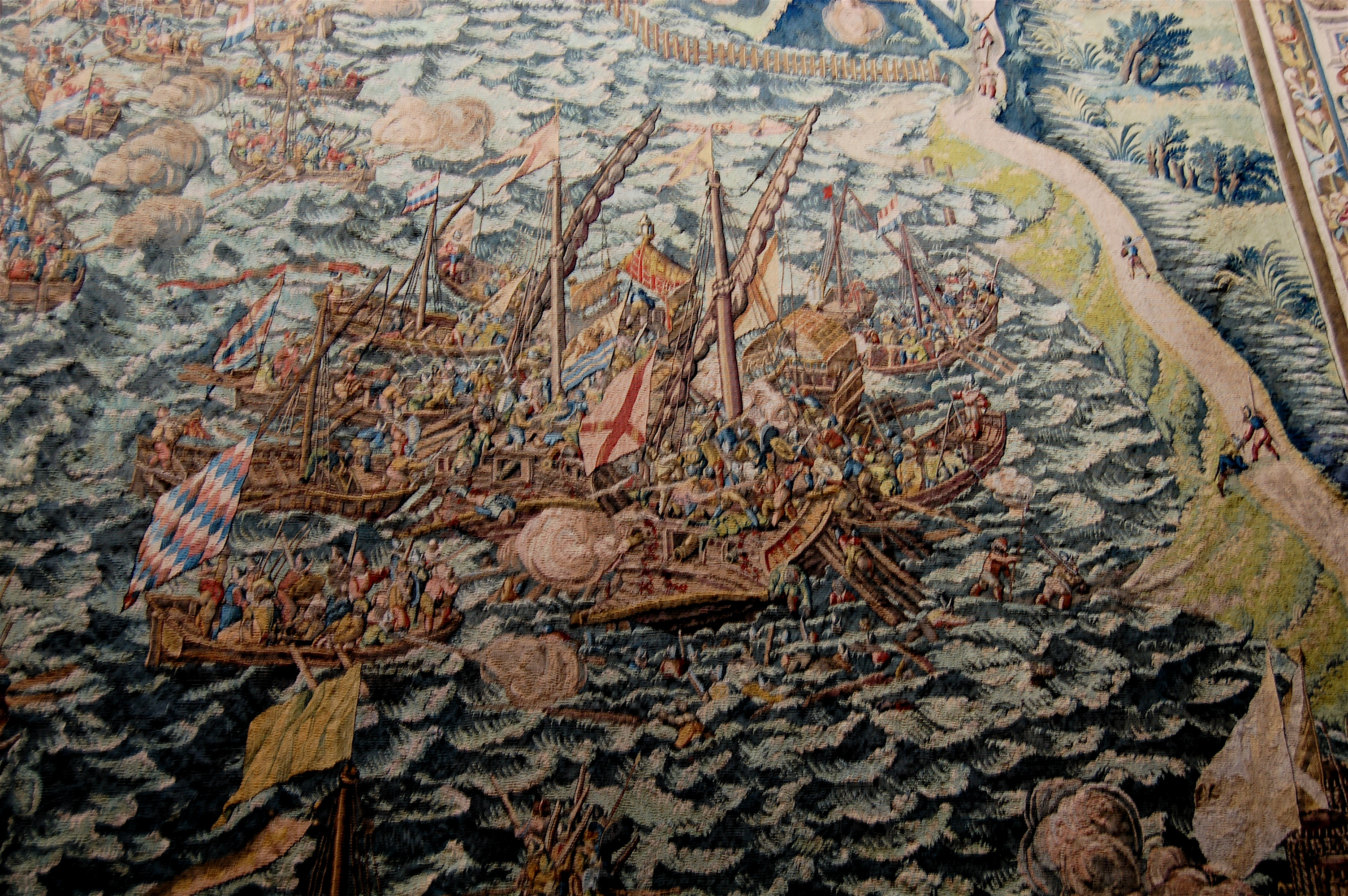 Wandtapijt Beleg van Zierikzee, Hendrick de Maecht Wandtapijt Beleg van Zierikzee (detail), Hendrick de Maecht 1599 - 1600